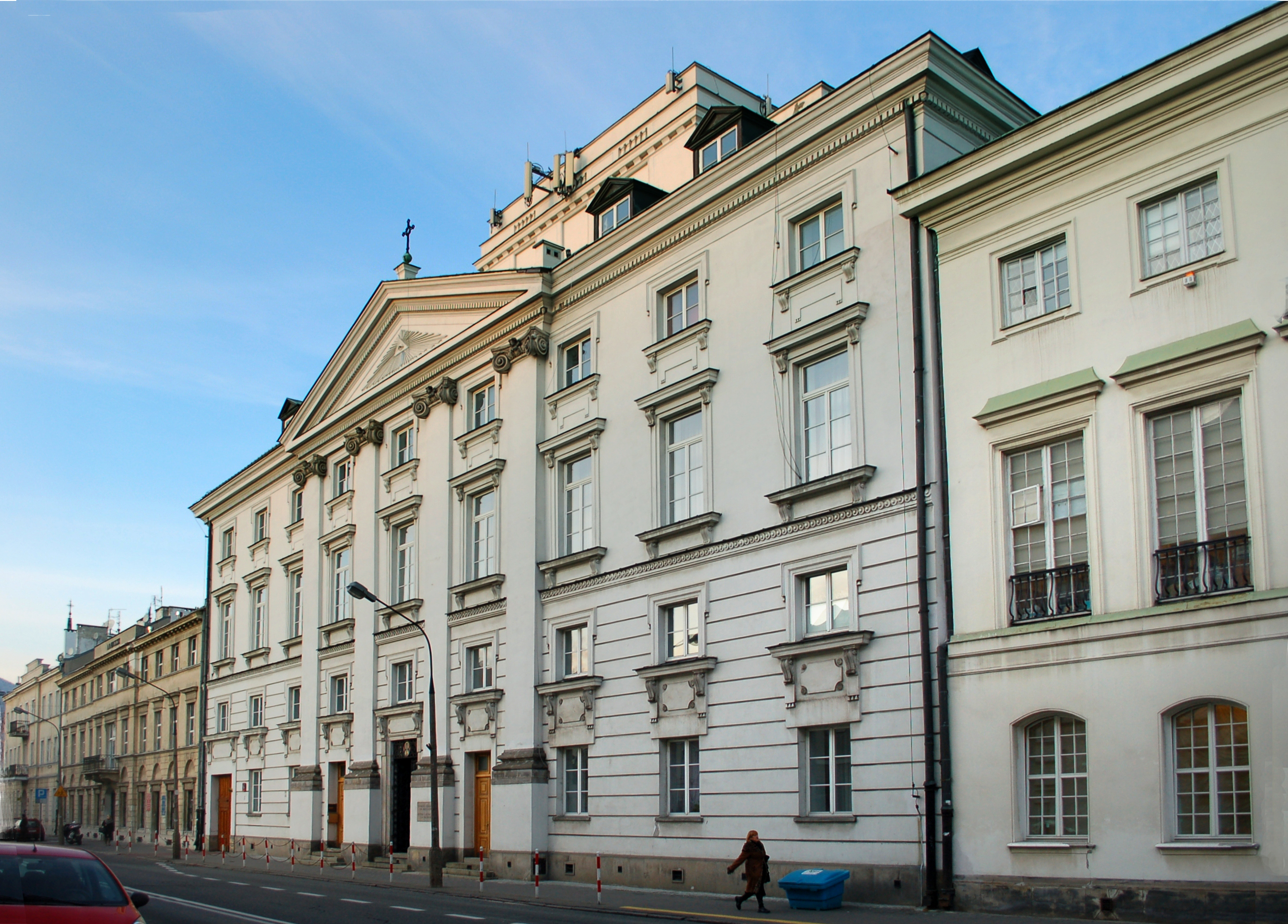 Ulica Miodowa, Warsaw